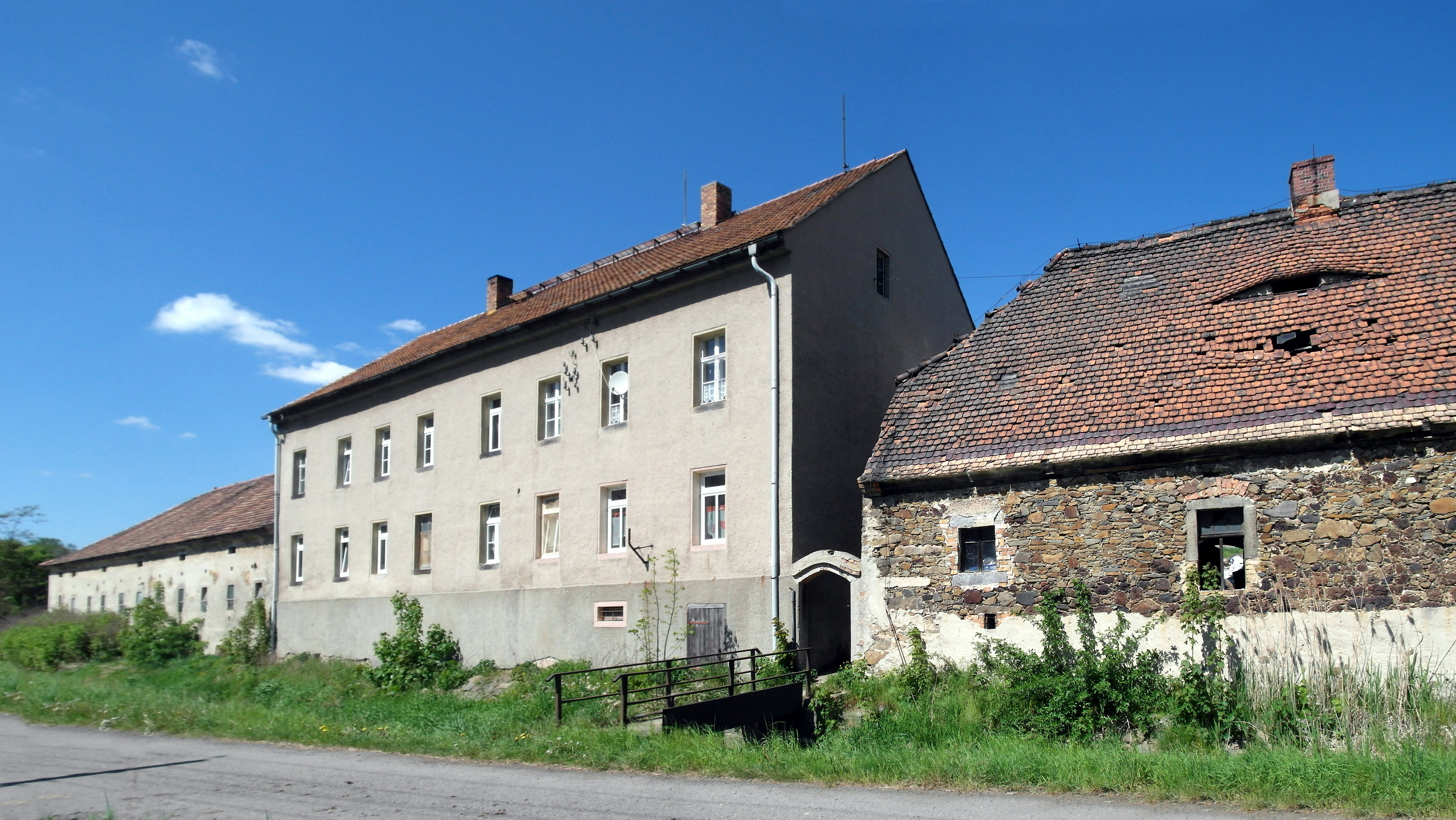 09.05.2016 02994 Großgrabe (Gemeinde Bernsdorf): Herrenhaus des Rittergutes, Landseite. Der Türstock des Hofeingangs trägt die Jahreszahl 1864, die auf einen Umbau hinweist. Das Anwesen ist älter. In den 1580er Jahren gehörte es zur Standesherrschaft Königsbrück. Nach mehrfachem Wechsel war das Gut bis 1945 im Besitz der Grafenfamilie zu Stolberg-Stolberg. Das Gut war verpachtet. Der letzte Pächter vor der 1945 durchgeführten Enteignung war ein Herr Sieber. Das Herrenhaus war Mitte der 1970er Jahre abgebrannt. Der heutigen Besitzerfamilie, die das Gut 2004 erwarb und ökologischen Landbau und einen Pferdehof betreibt, widerfuhr ein erneuter Brandschaden. [SAM5833+5836.JPG]20160509640MDR.JPG(c)Blobelt